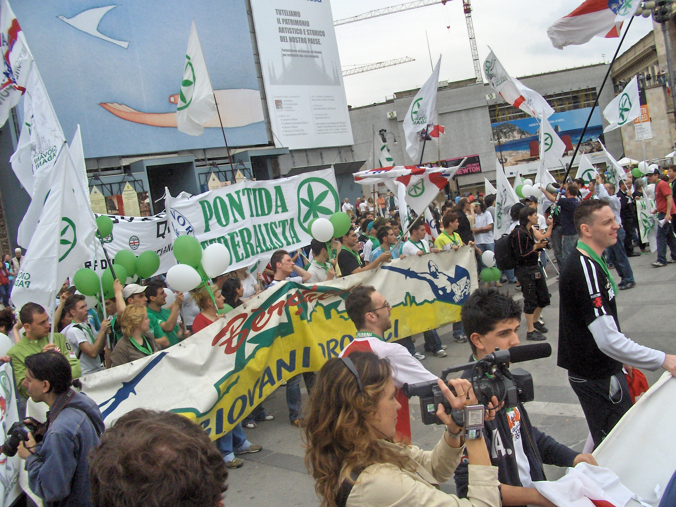 MGP Davanti al duomo